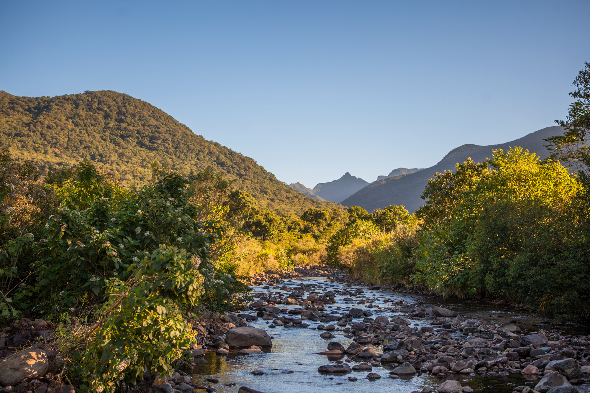 A mata atlântica esconde belezas incríveis pelo interior do Canyon